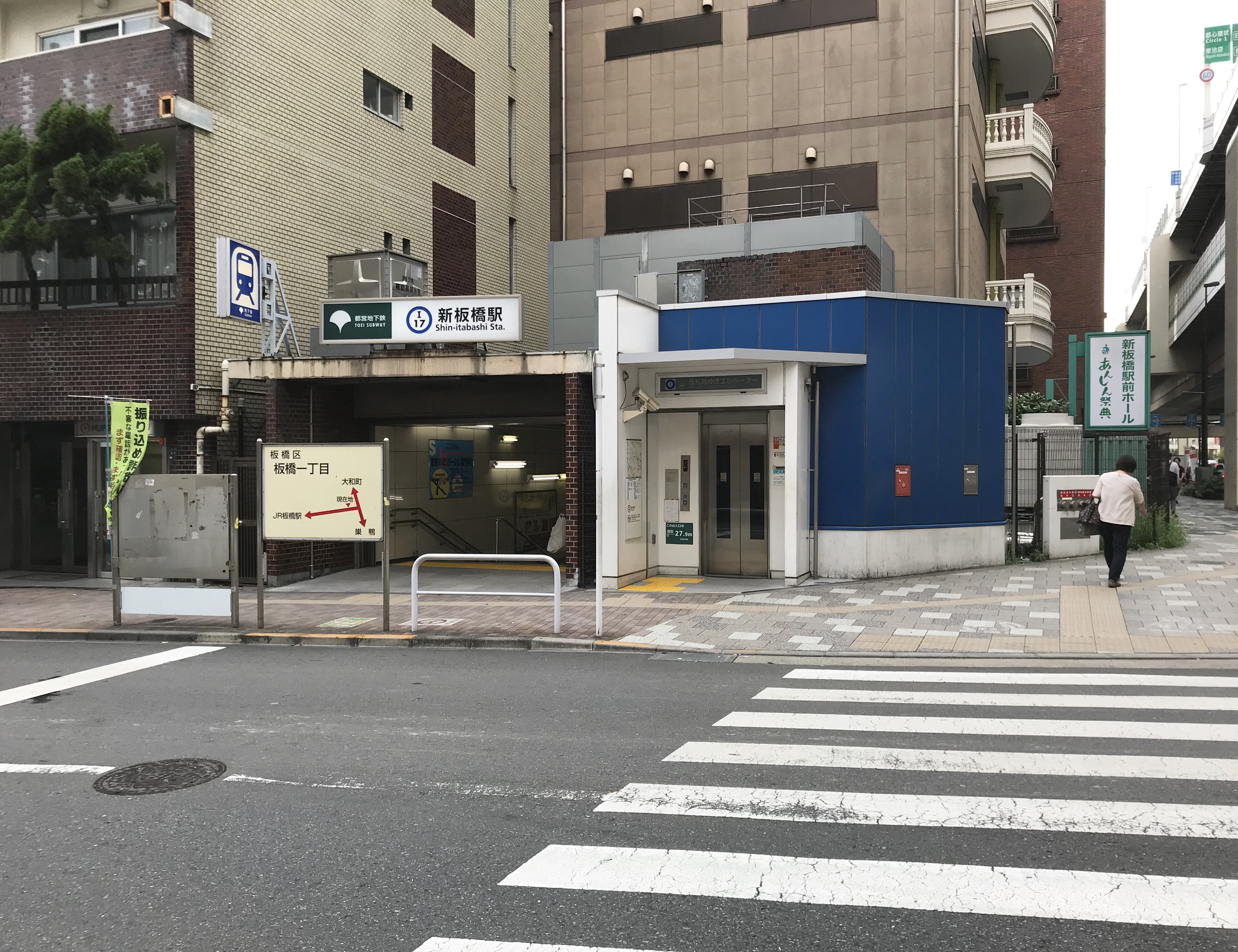 都営地下鉄三田線新板橋駅A3番出入口